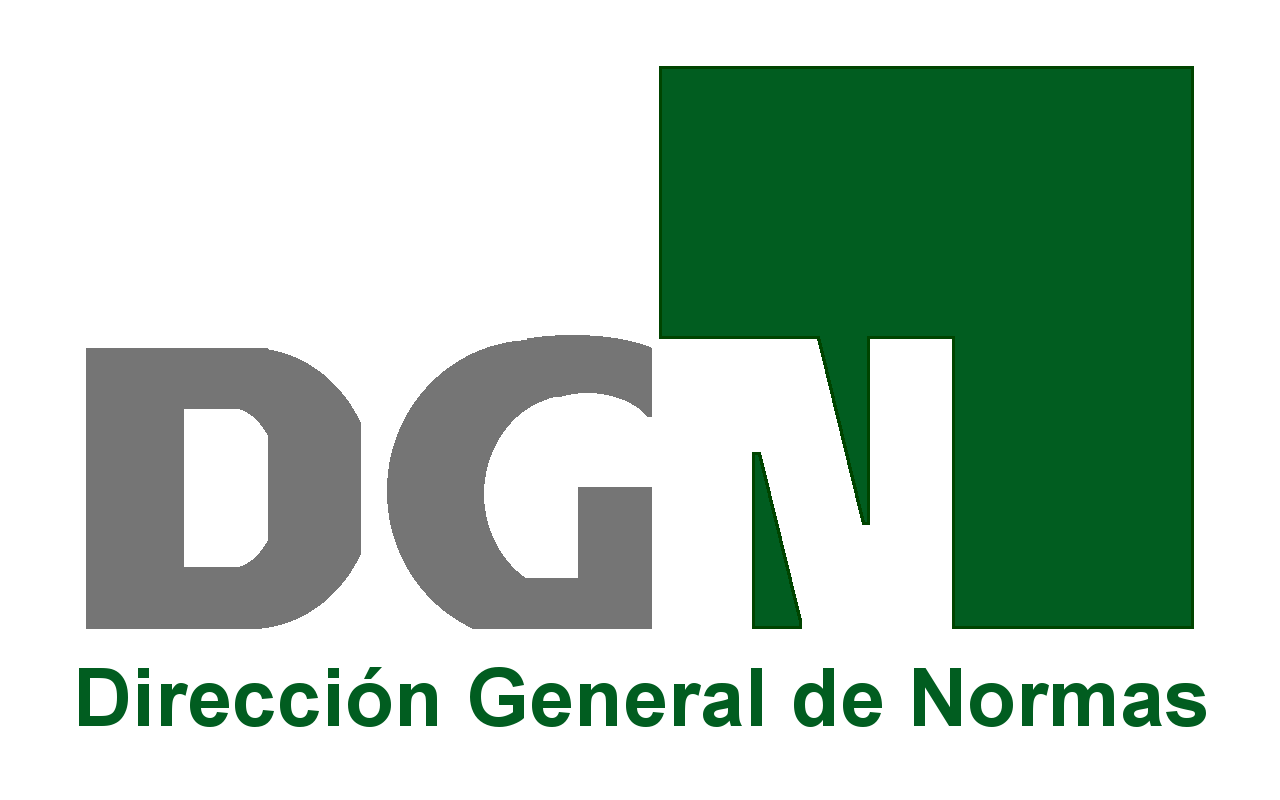 Logo DGN